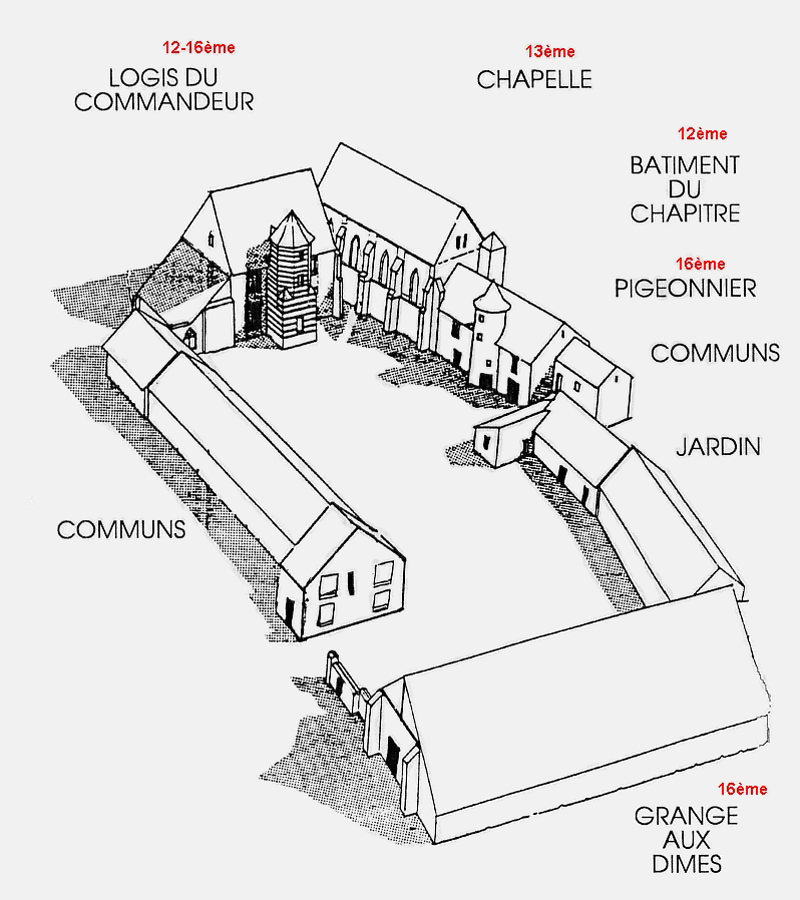 Plan de la commanderie des templiers de Coulommiers. retouches sur Image:Coulommiers templiers plan.jpg, portant la mention: inspiré de "Les cahiers de la commanderie",1,1998,ATAGRIF